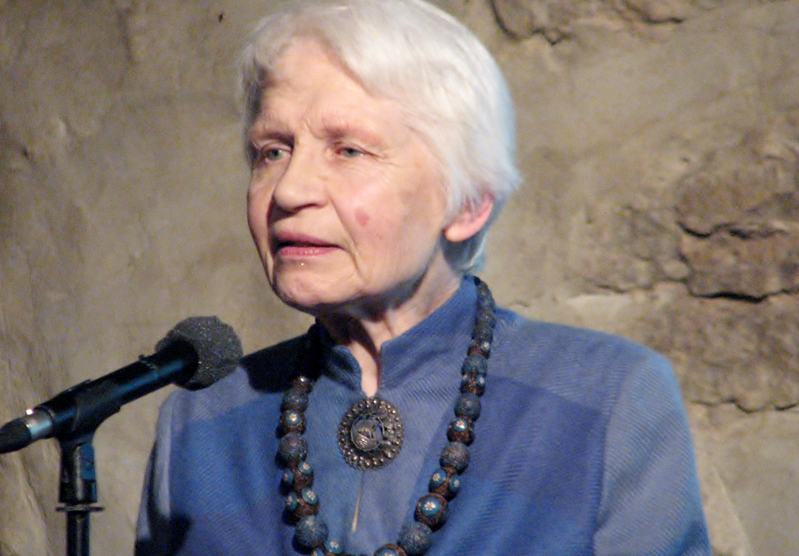 Silja Grünberg esinemas Vadja keele sõnaraamatu esitlusel Kloostri aidas